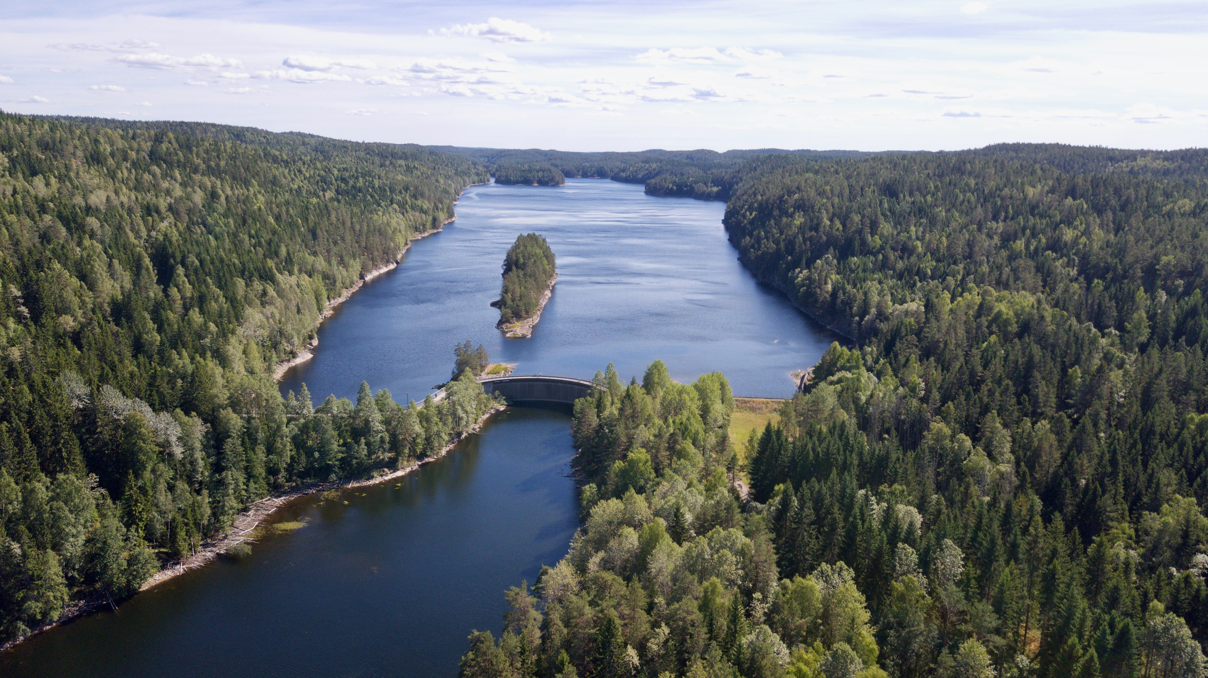 Nord-Elvåga i Østmarka, på grensen mellom Oslo og Lørenskog.